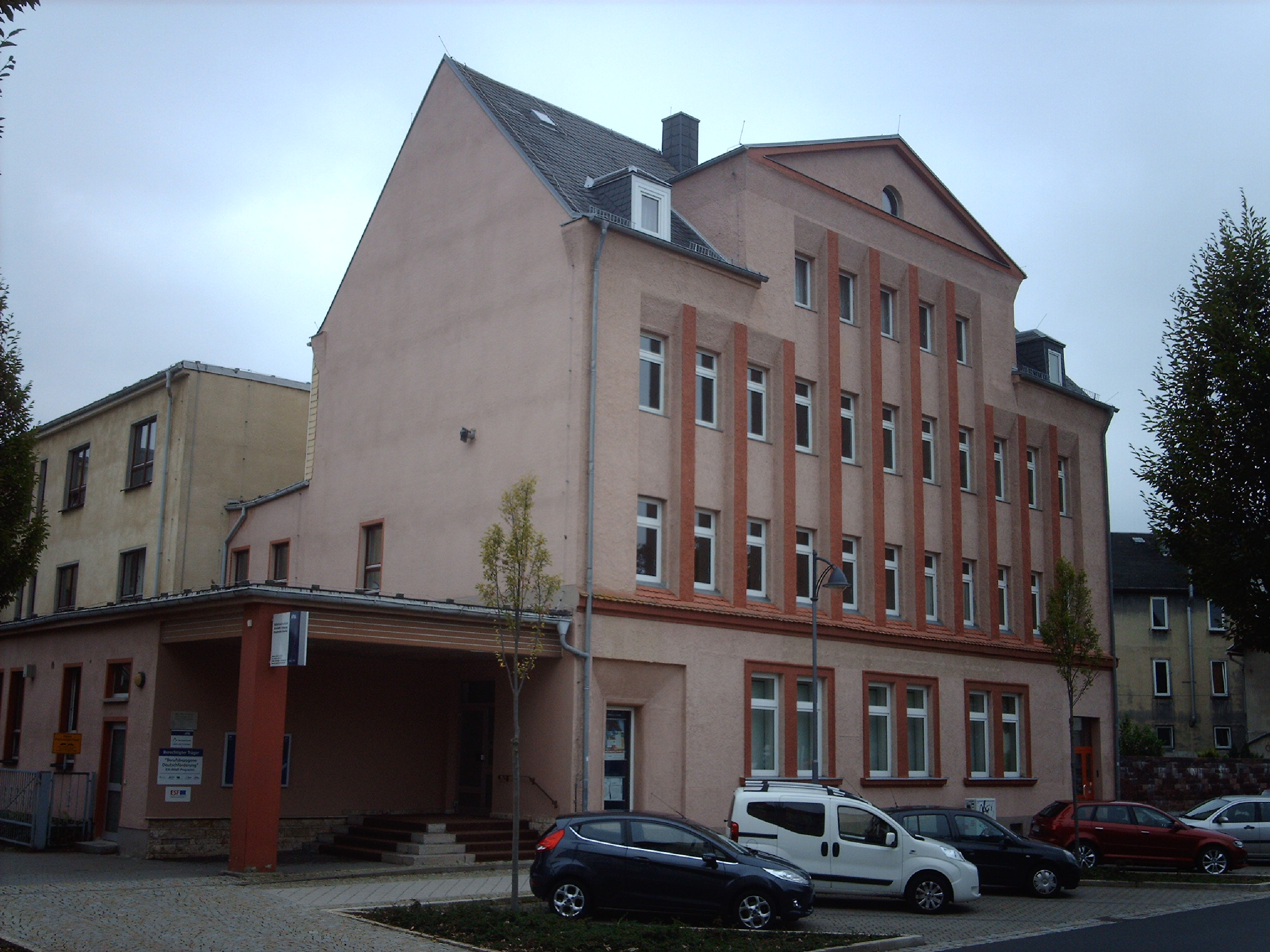 Volkshochschule Ilmenau Straßengebäude